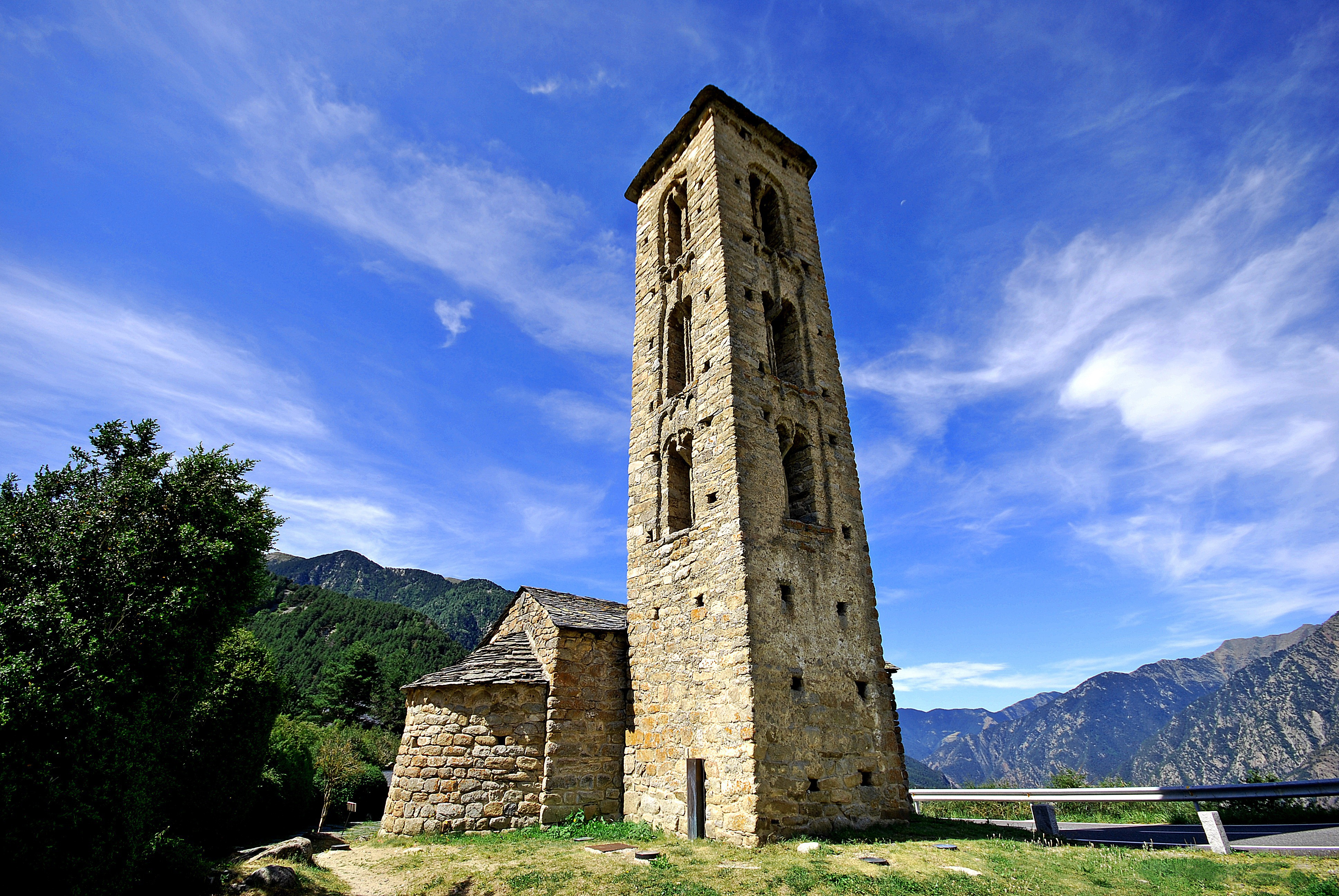 Església de Sant Miquel d'Engolasters (Escaldes-Engordany)